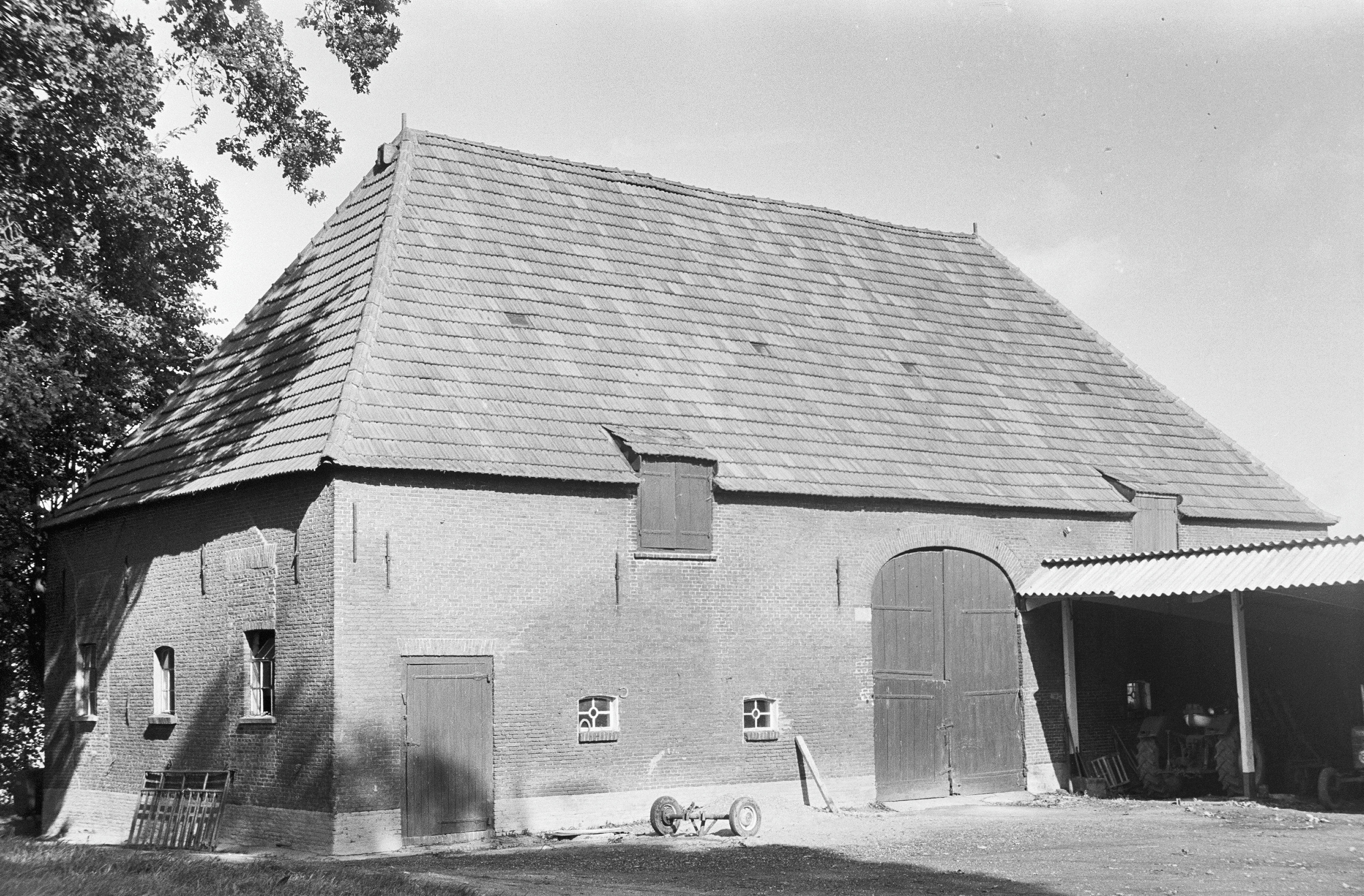 Kasteel Appeltern: bouwhuis